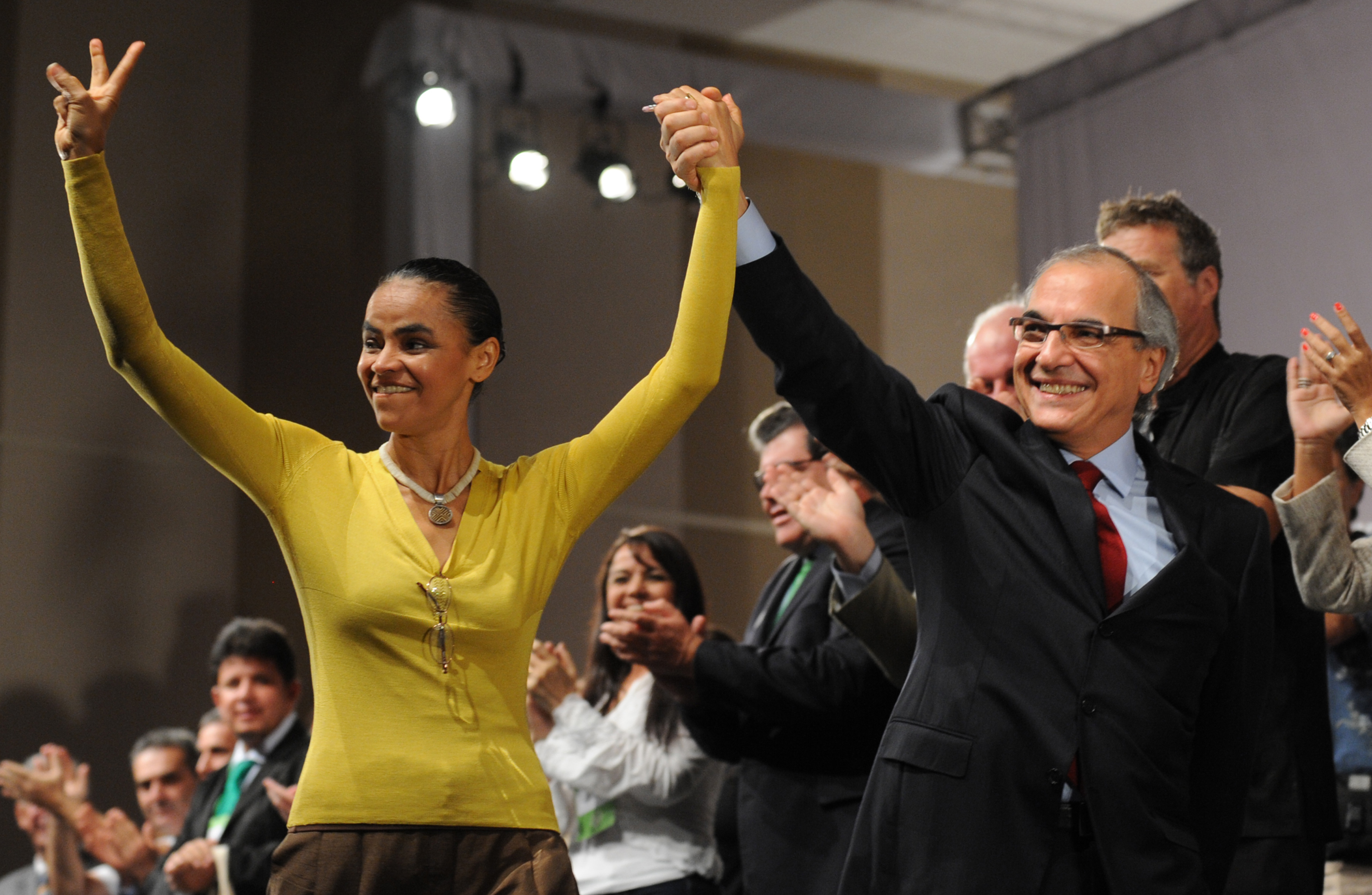 A candidatura da senadora Marina Silva à Presidência da República foi lançada oficialmente pelo PV. Ao lado, o candidato à vice, o empresário Guilherme Leal.